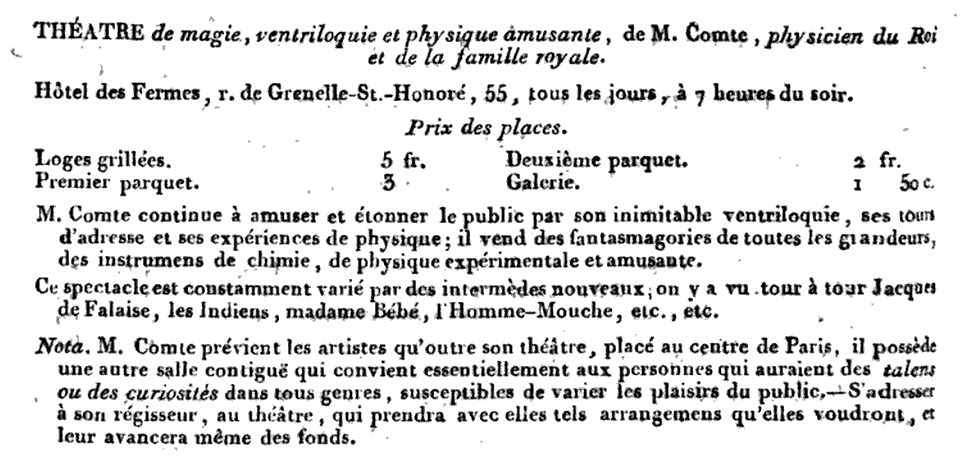 Annonce dans l'Almanach du commerce de Paris, des départemens de la France et des principales villes du monde.